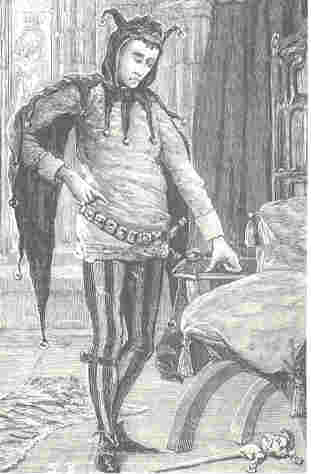 Rahere, Bouffon de Henry I et de la Reine Matilda, début 1100.